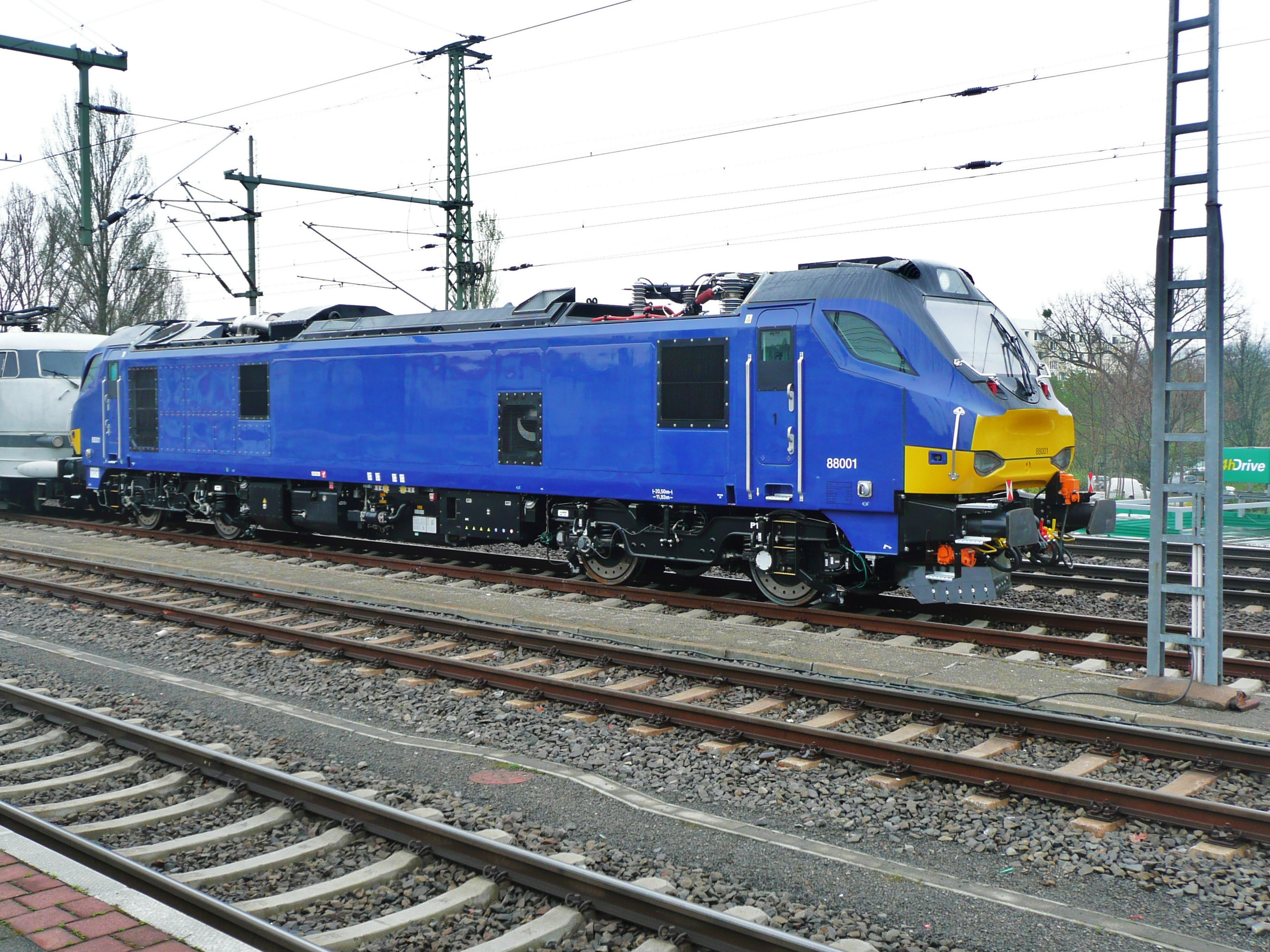 Vossloh Class 88 aufgenommen in Dresden Hbf